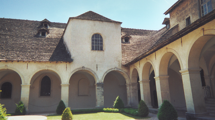 Sujet : bras sud du Transept de l'abbaye de Crémieu dans l'Isère Date : 9 juin 2005 Source : photo personnelle d'Archeos Description : bras sud du transept de l'église de l'abbaye des Augustins de Crémieu, posé au-dessus du cloître (surélevé par-rapport au niveau du sol de l'église) Orientation (du sujet, le photographe lui faisant face) : vers le sud (photo prise vers 12h30) Licence : Mots-clés : architecture religieuse